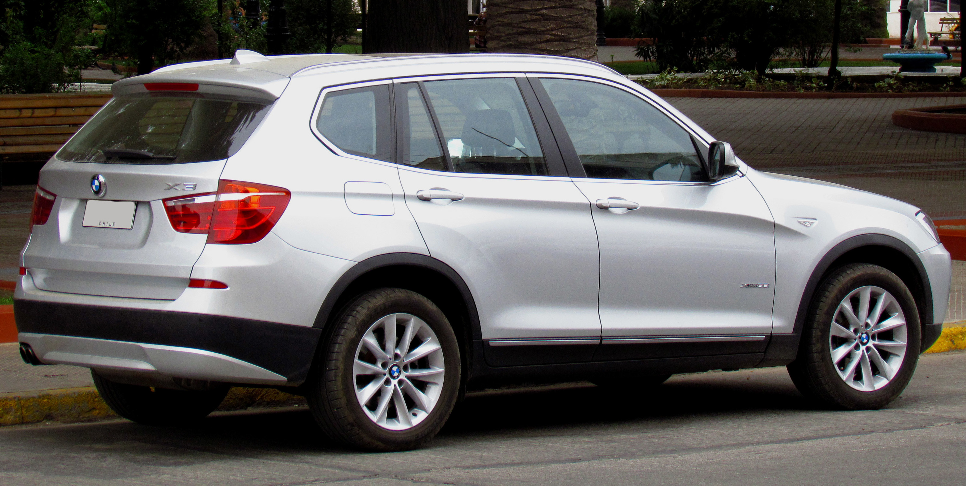 BMW X3 Xdrive35i 2012